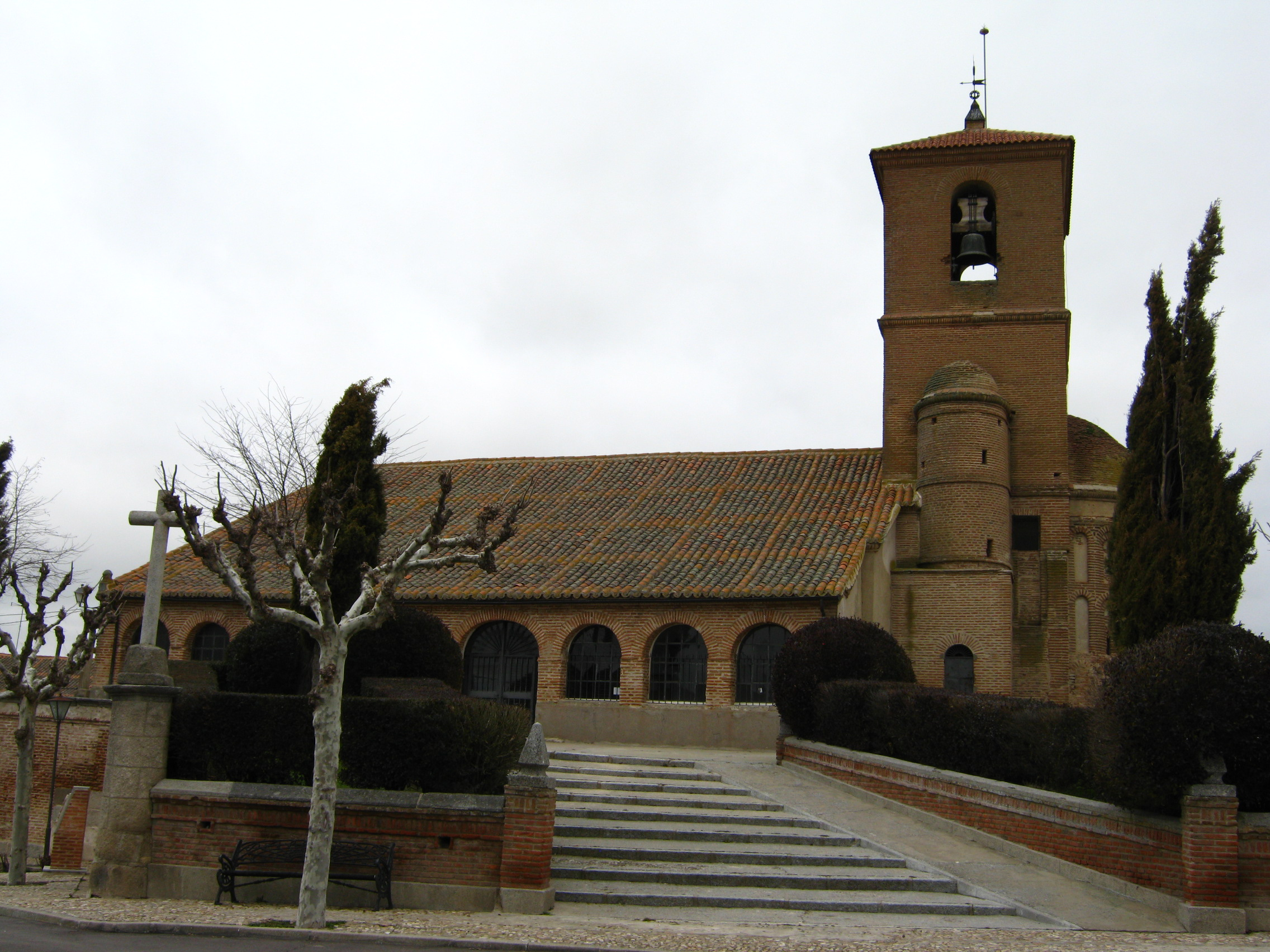 Iglesia parroquial de Aldeaseca de la Frontera (Salamanca, Reino de León)